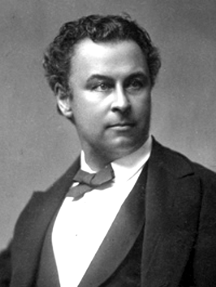 Győry Vilmos (Győr, 1838. január 7. – Budapest, 1885. április 14.) magyar evangélikus lelkész, teológus, író, műfordító, a Magyar Tudományos Akadémia levelező tagja.